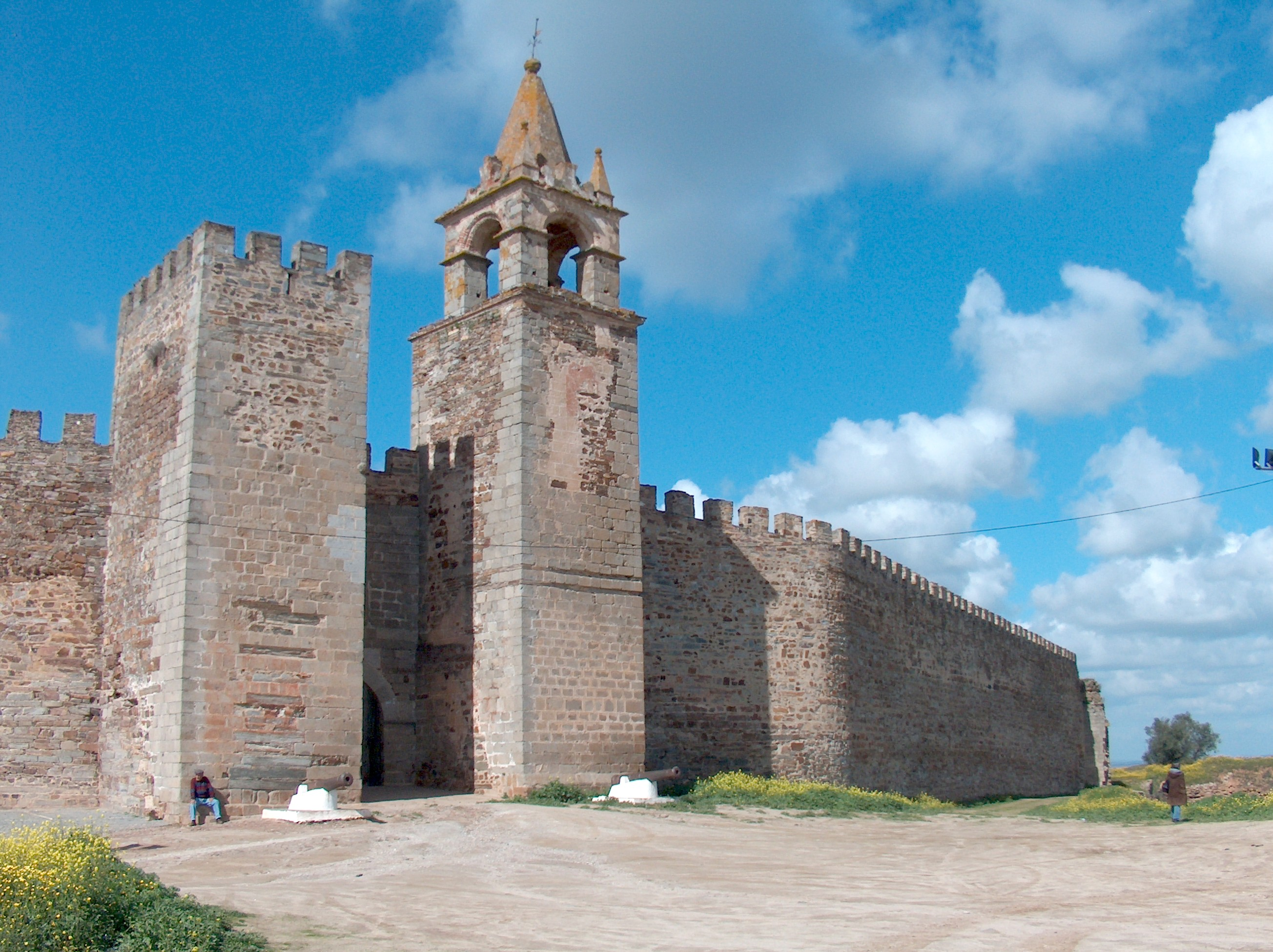 Castelo de Mourão,(freguesia e concelho de Mourão, distrito de Évora).